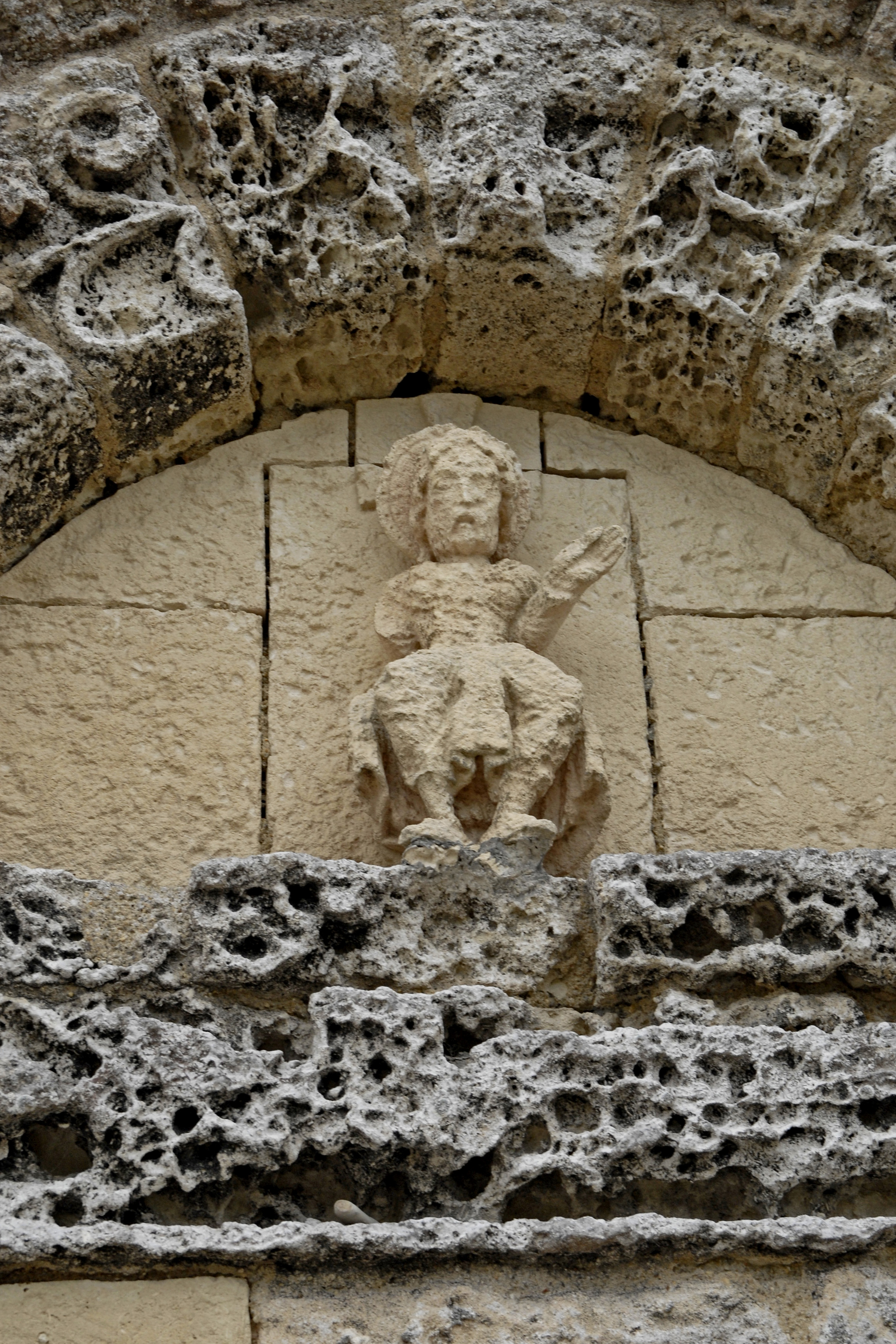 Sainte-Radegonde-Talmont-sur-Gironde, rechtes Scheinportal, Christus mit Kreuznimbus